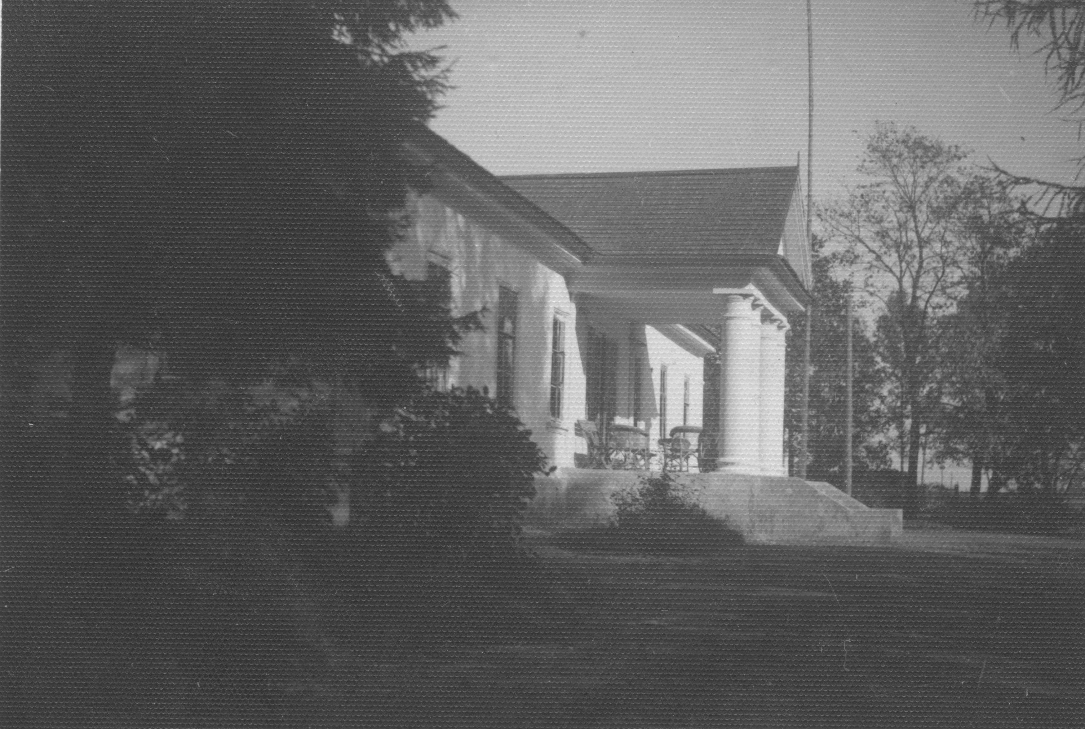 Беларуская (тарашкевіца): Стайкі (Stajki), сядзіба Багдановічаў (Bahdanovič)